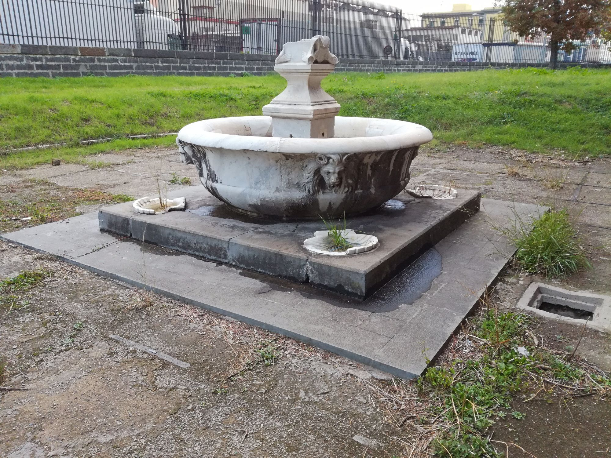 Fontana del Carminiello al Carmine (Napoli)